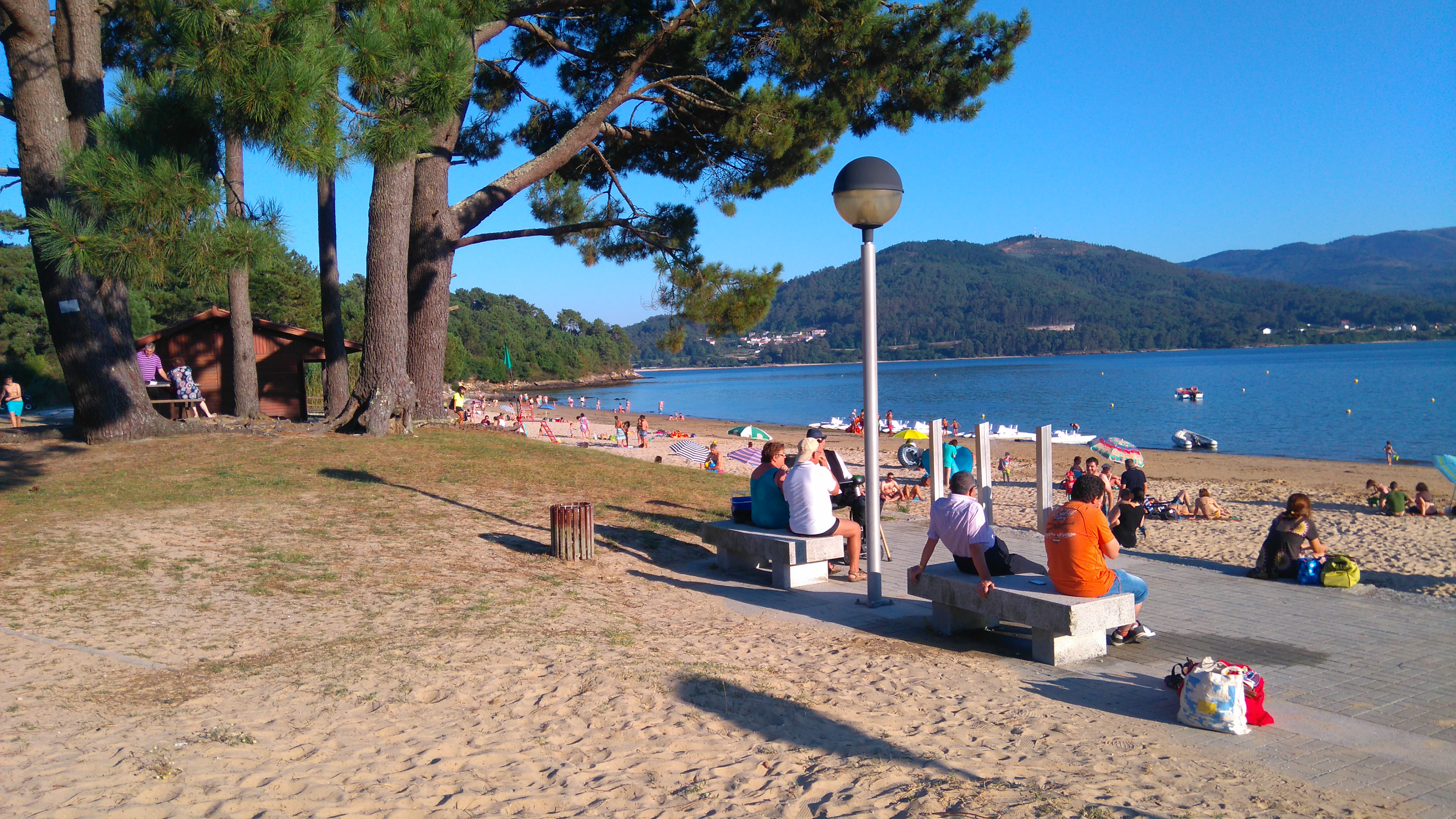 Praia de Broña, Outes